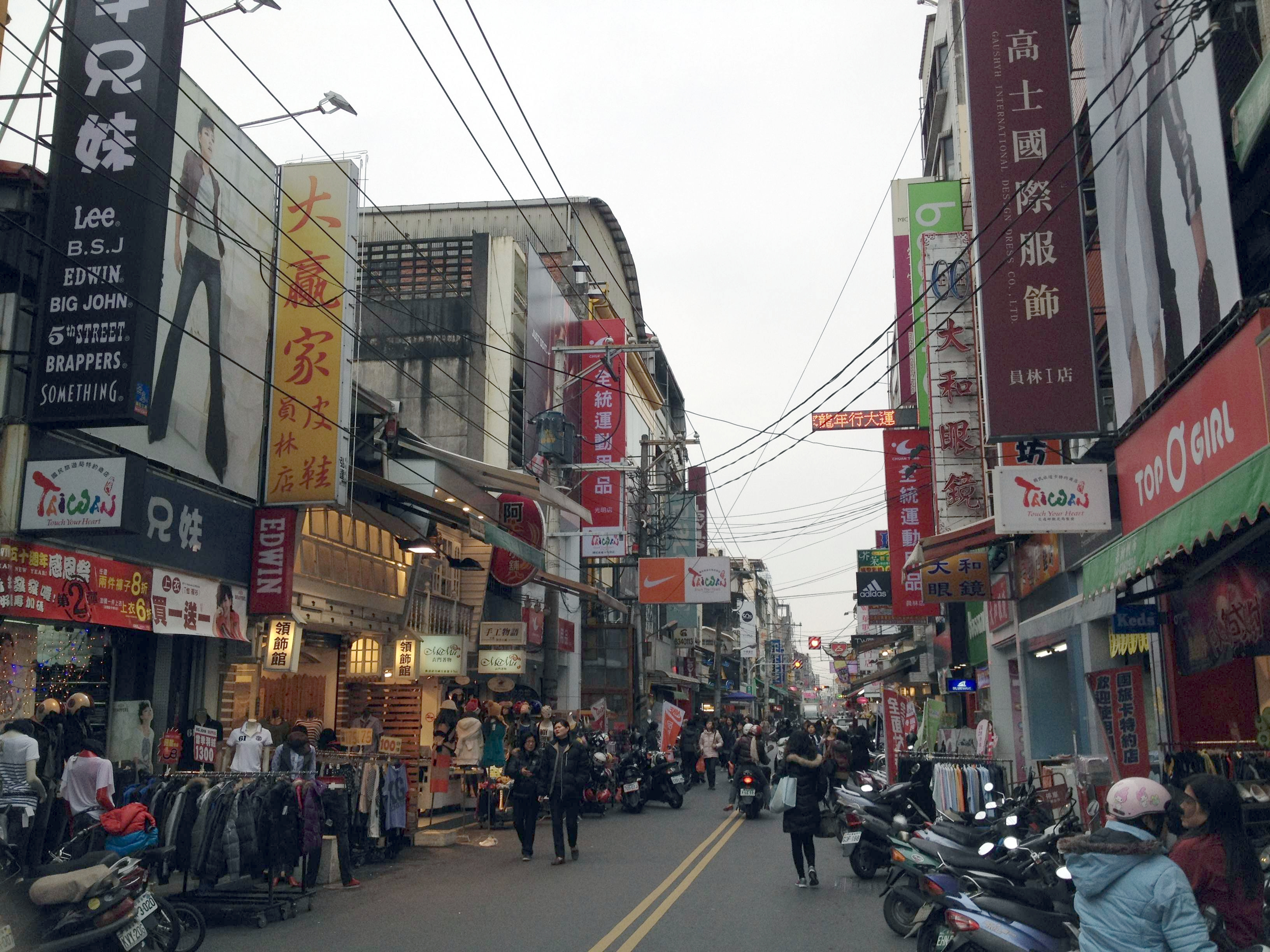 彰化縣員林鎮光明街街景。